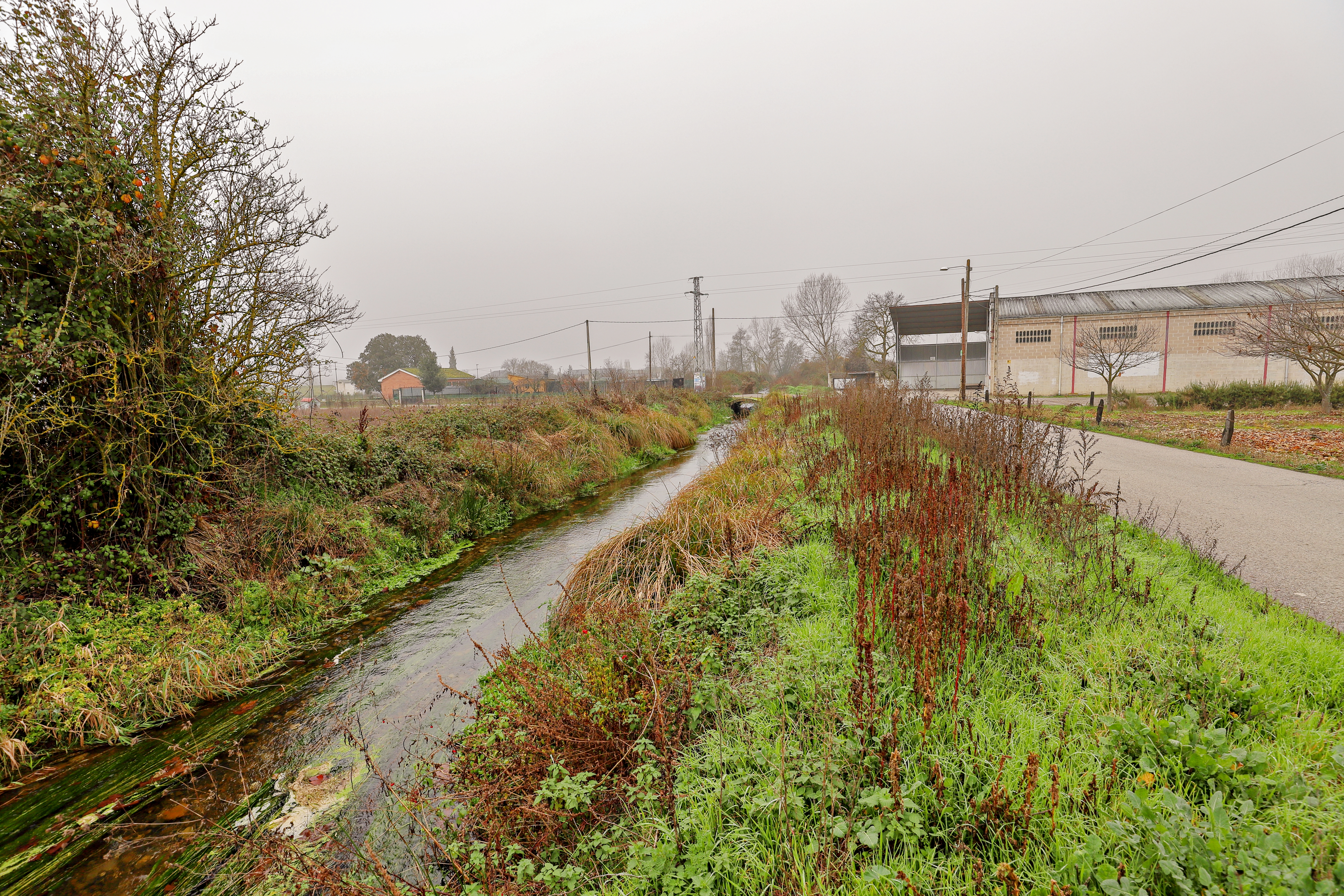 La Martina es una localidad del municipio de Ponferrada, en la comarca de El bierzo, provincia de León.